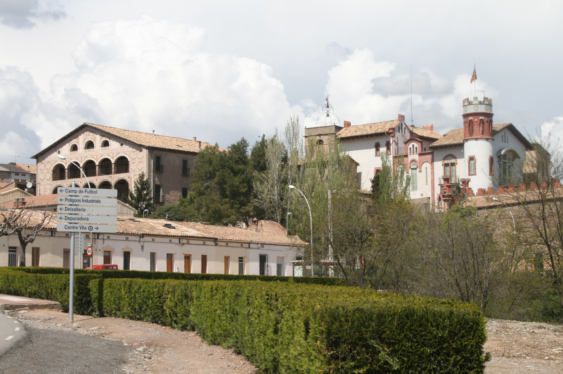 Avinyó (Bages).